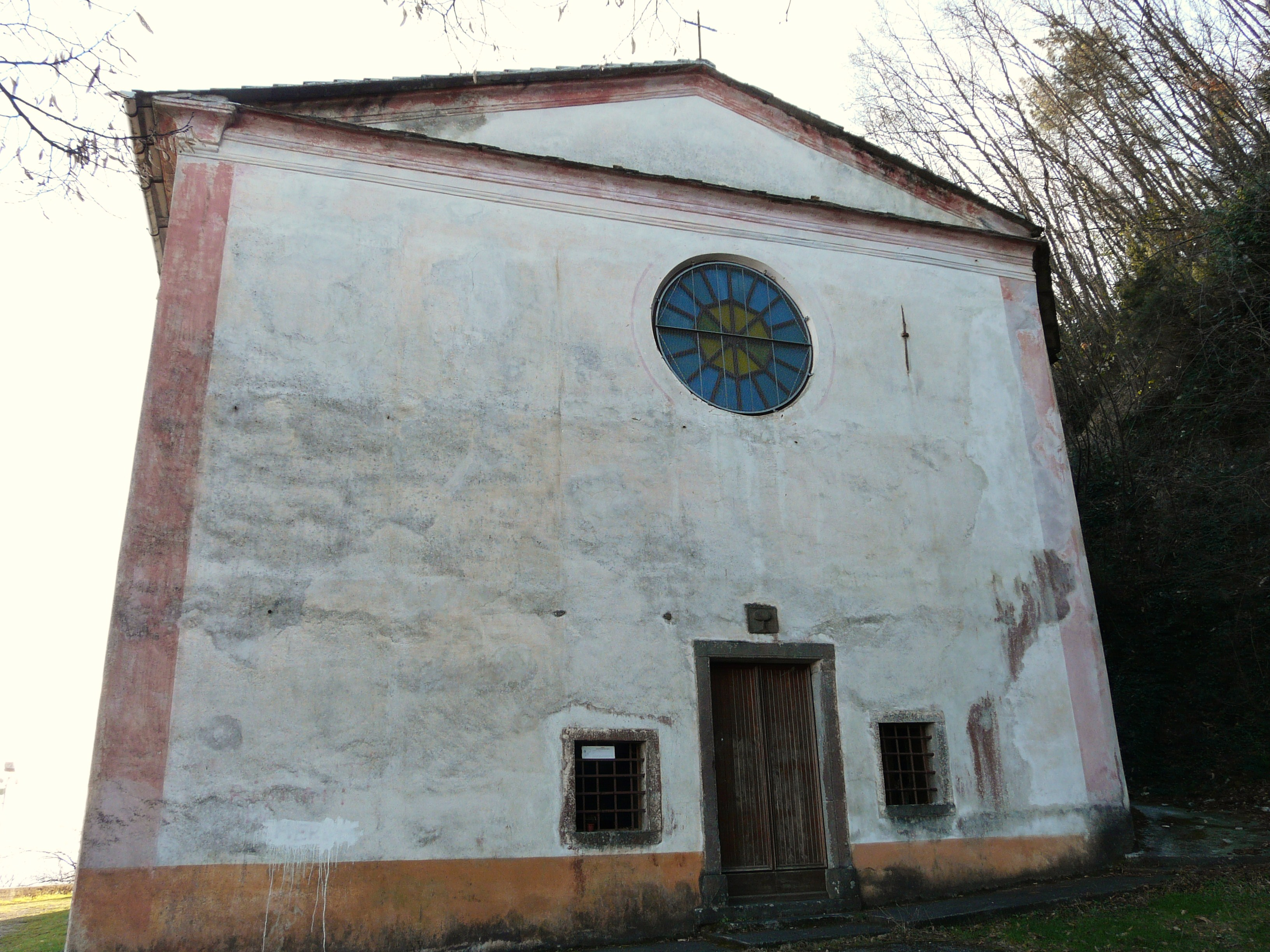 Santuario di Nostra Signora dell'Agostina, Riccò del Golfo di Spezia, Liguria, Italia